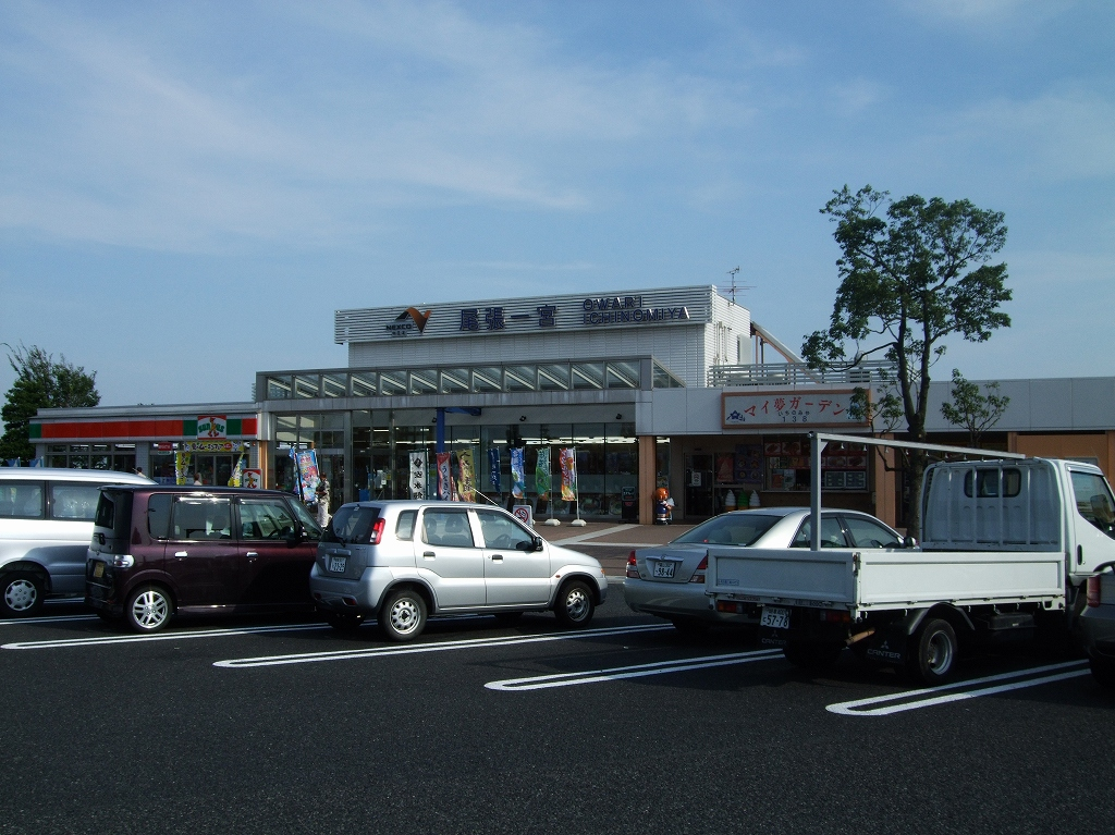 名神高速道路 尾張一宮パーキングエリア（下り線・京都方面）